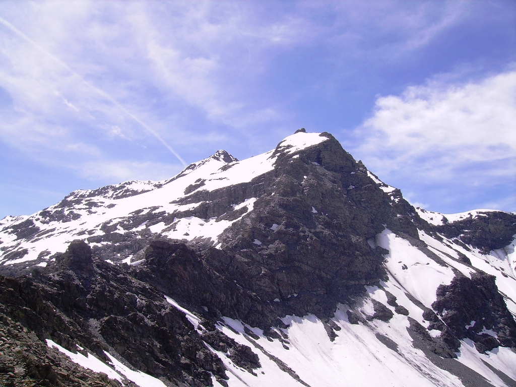 photo prise depuis le col de mont